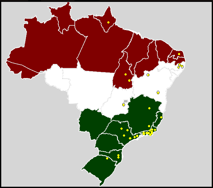 brazil